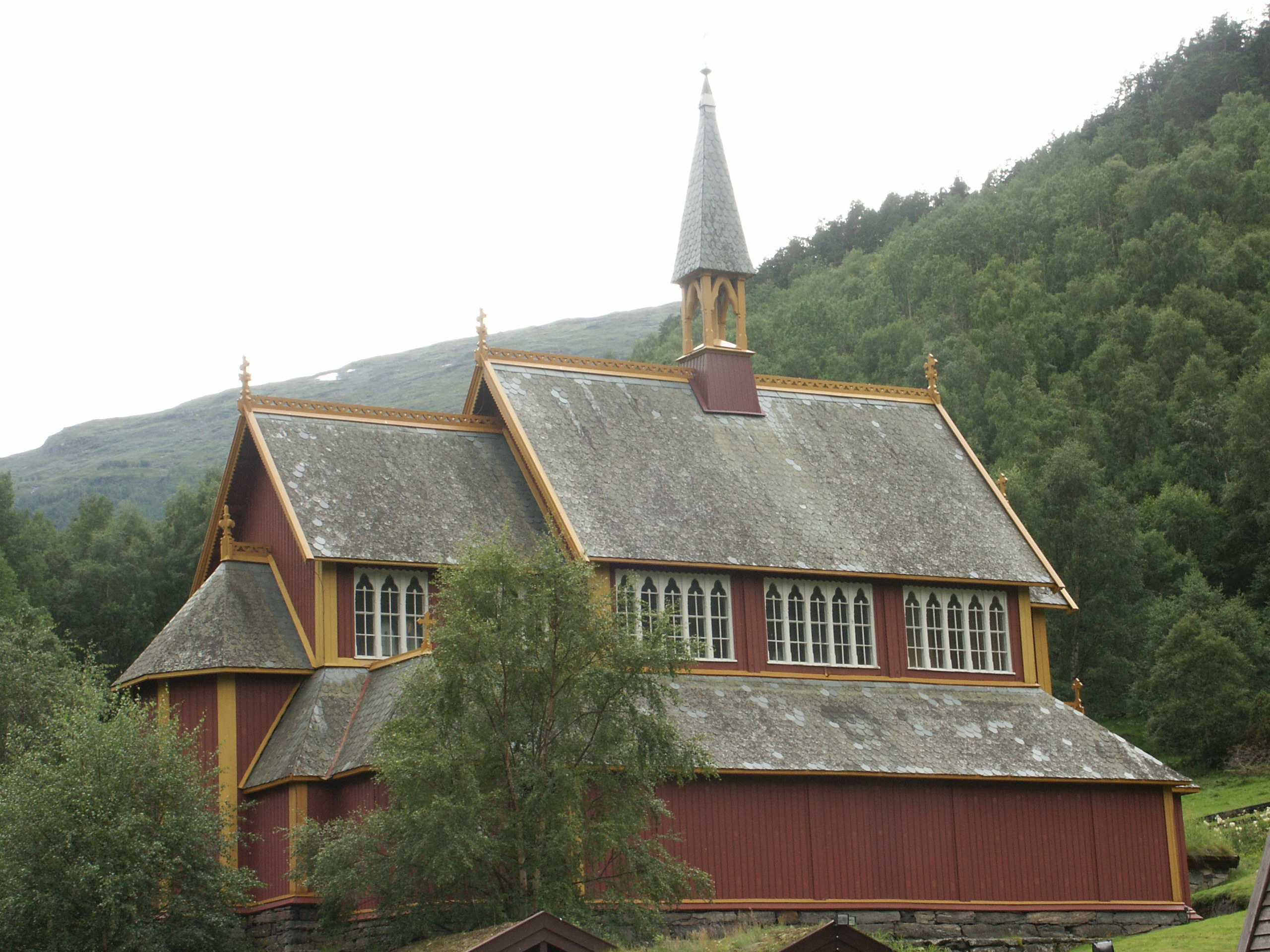 Borgund church in Lærdal